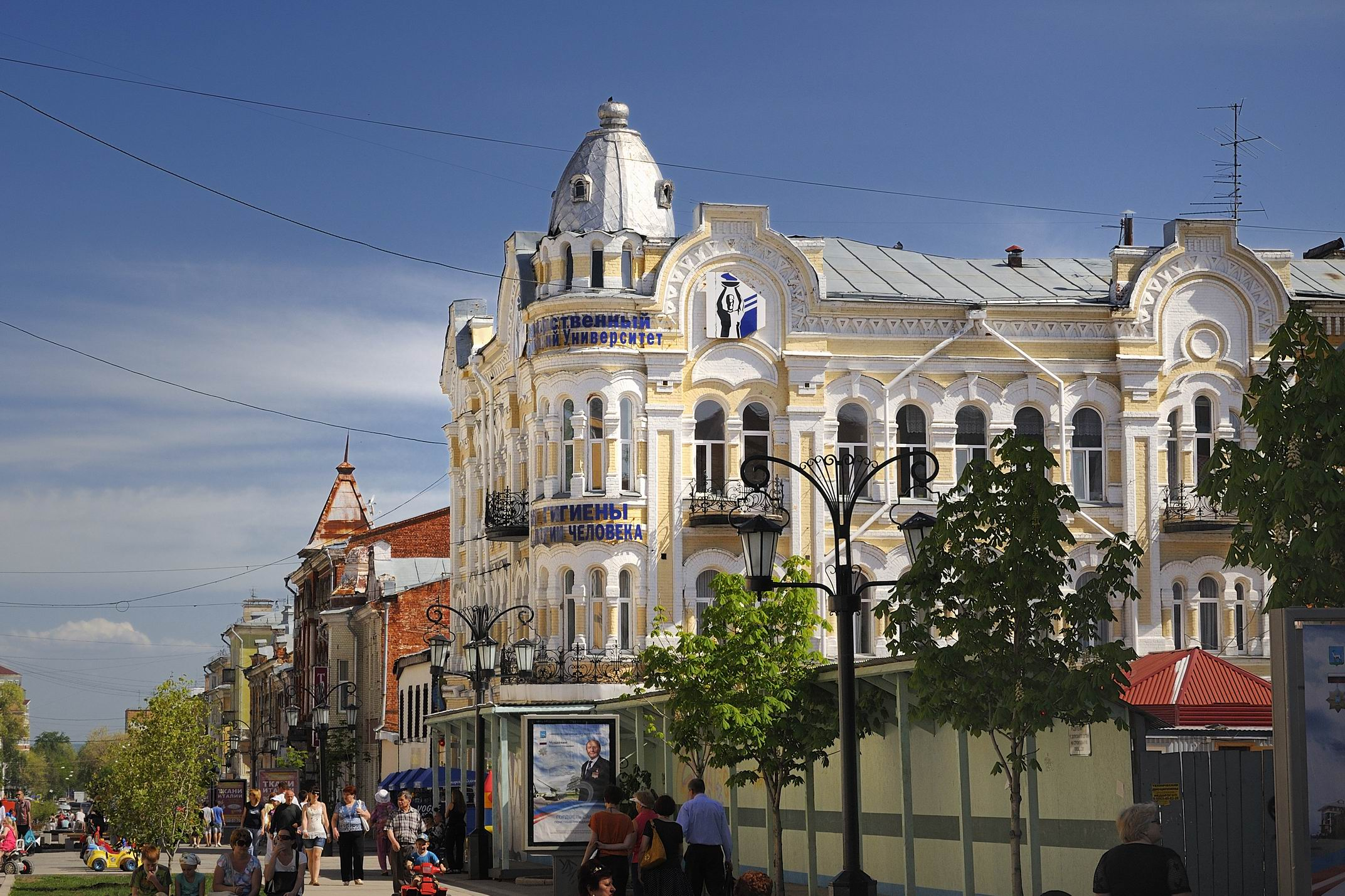 Дом Сидорова, Самара